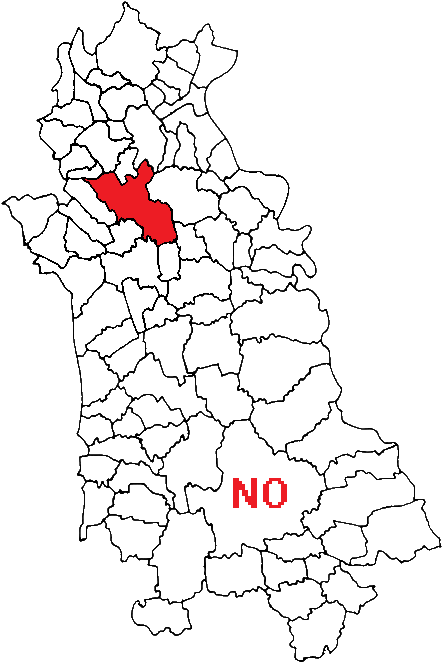 Mappa con posizione del comune nella provincia italiana di Novara